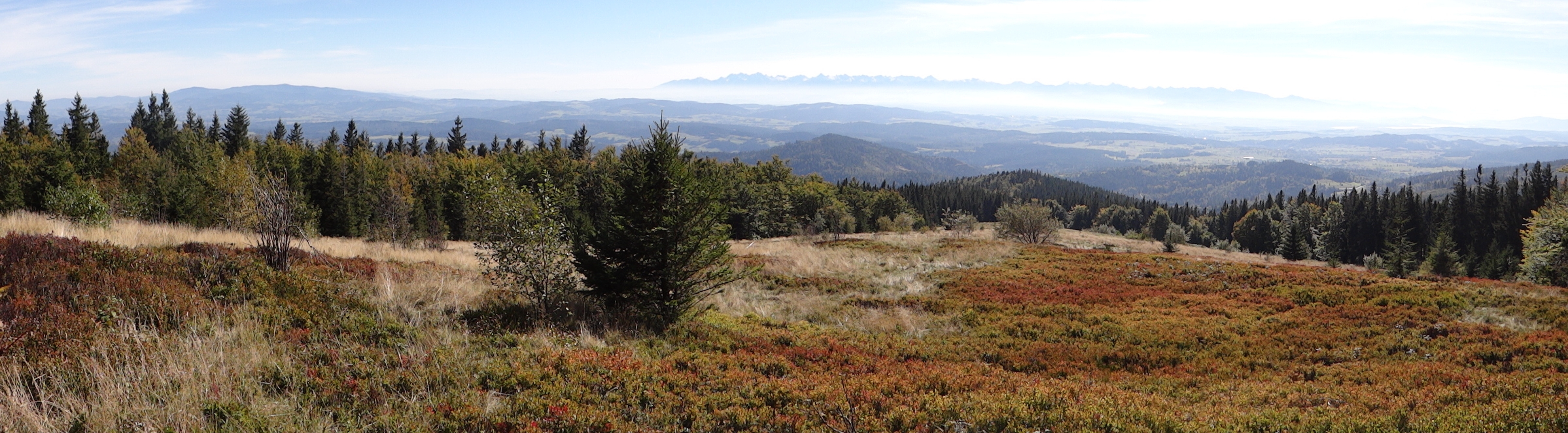 Hala Krupowa. Panorama widokowa